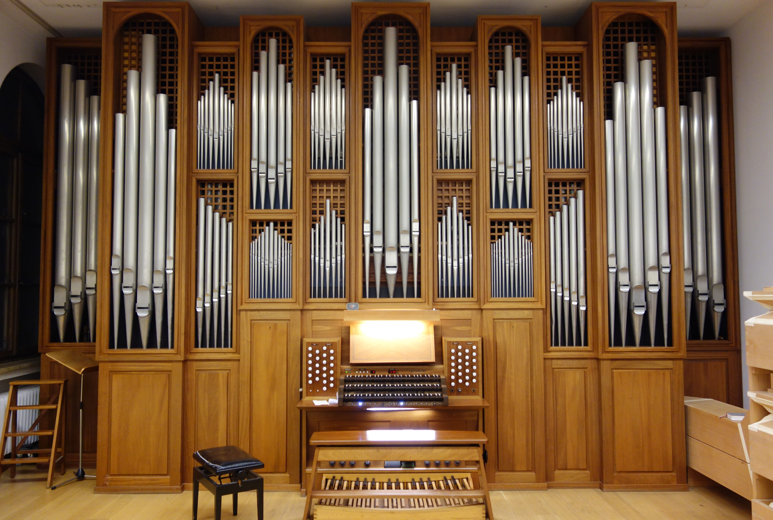 Schuke-Orgel der Musikhochschule München (1988, Karl Schuke Berlin, III/38)